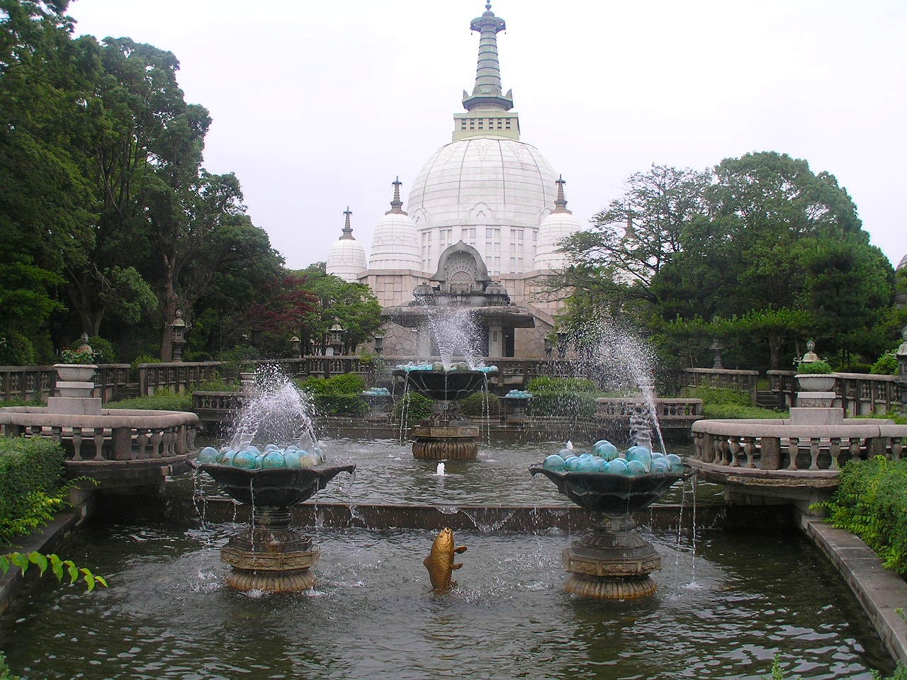 名古山霊園